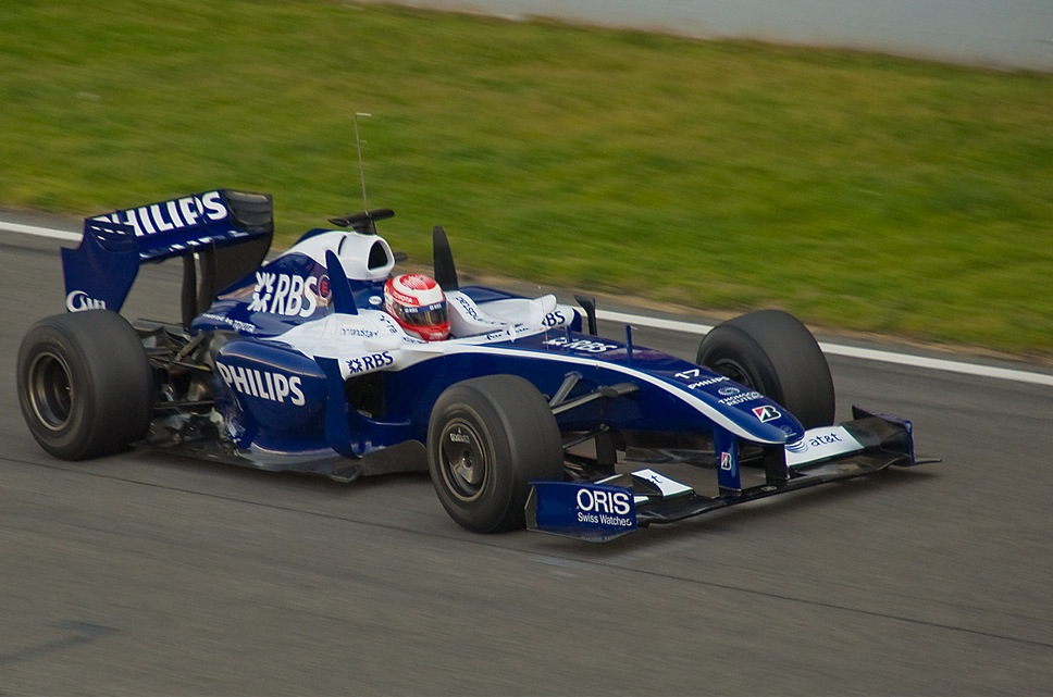 Nakajima Barcelona 2009 1/500s - F/6.3 - 200mm - ISO500